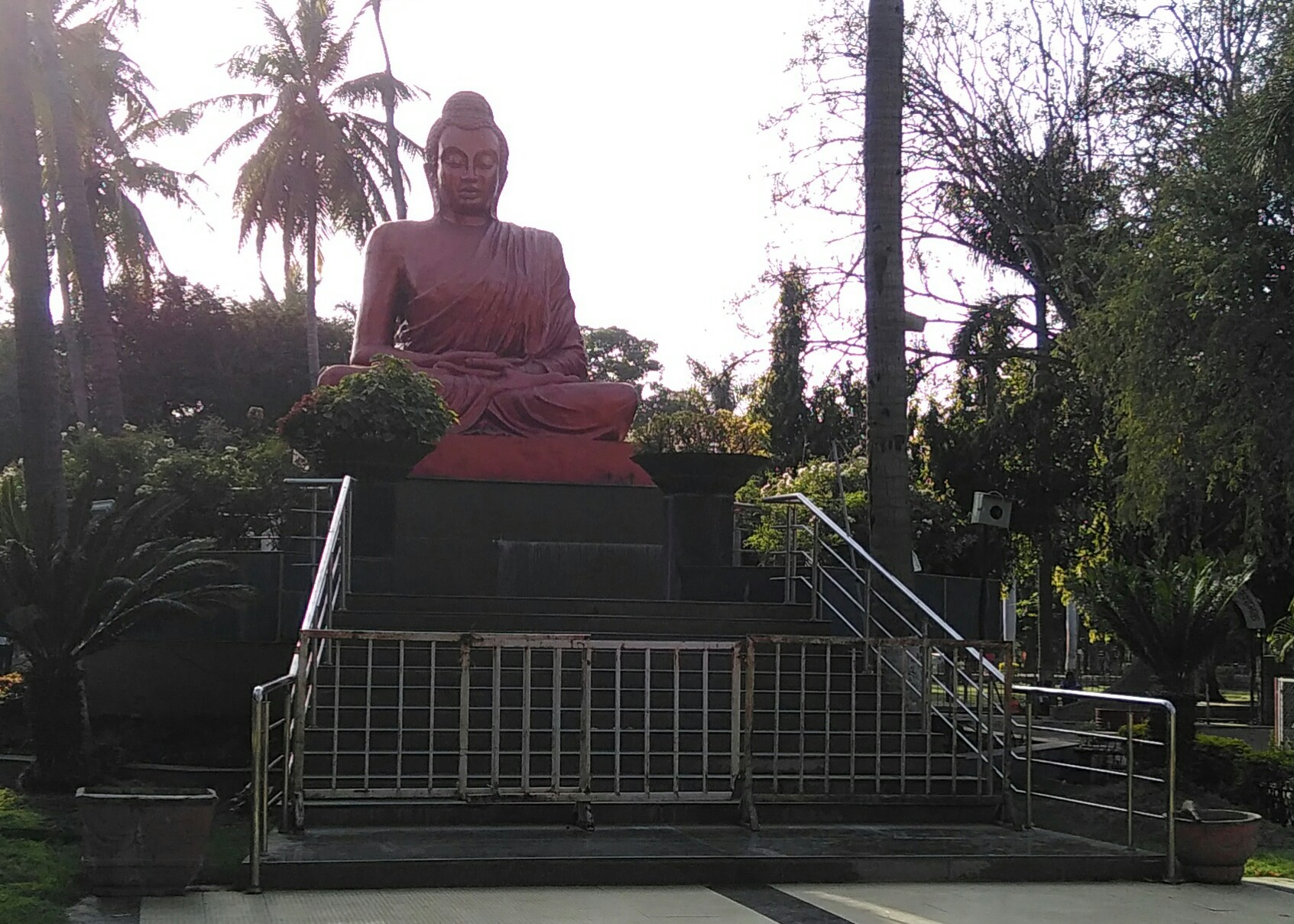 सिद्धार्थ उद्यान व प्राणिसंग्रहालयातील बुद्ध मुर्ती